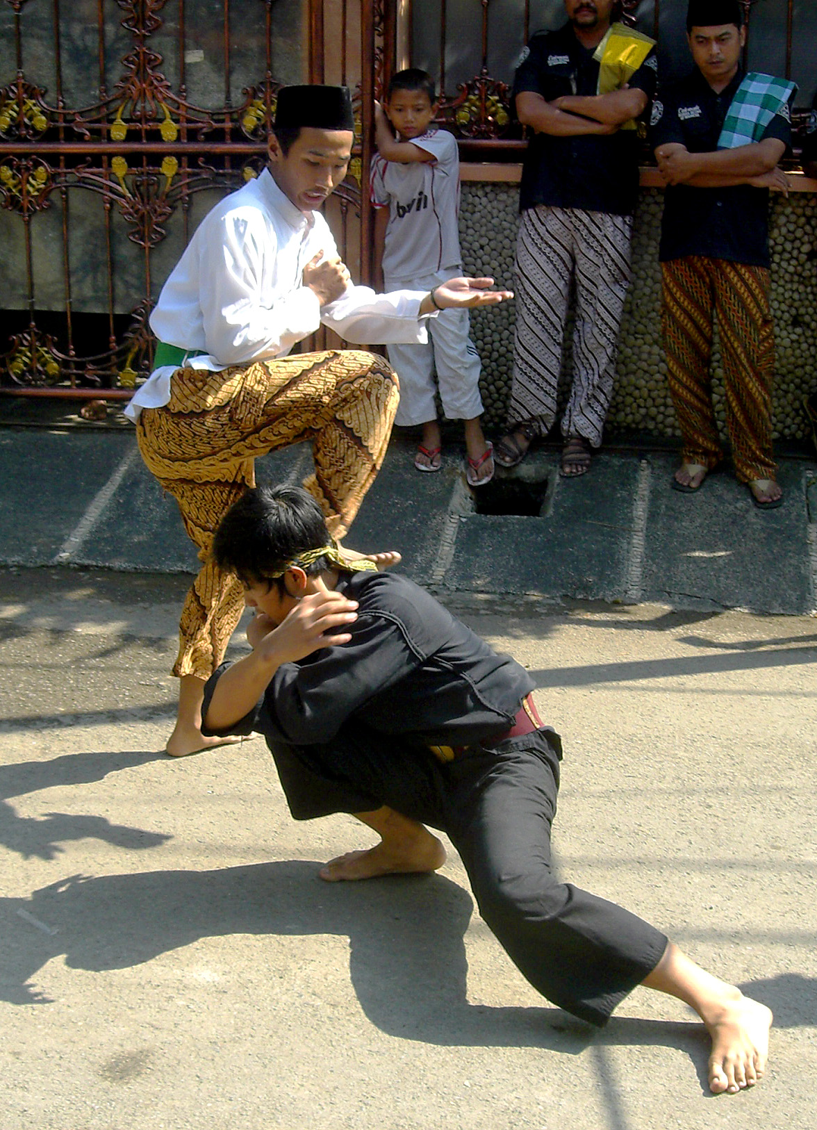 Pencak silat Betawi style performed during Betawi wedding ceremony. Rawasari, Jakarta, Indonesia.